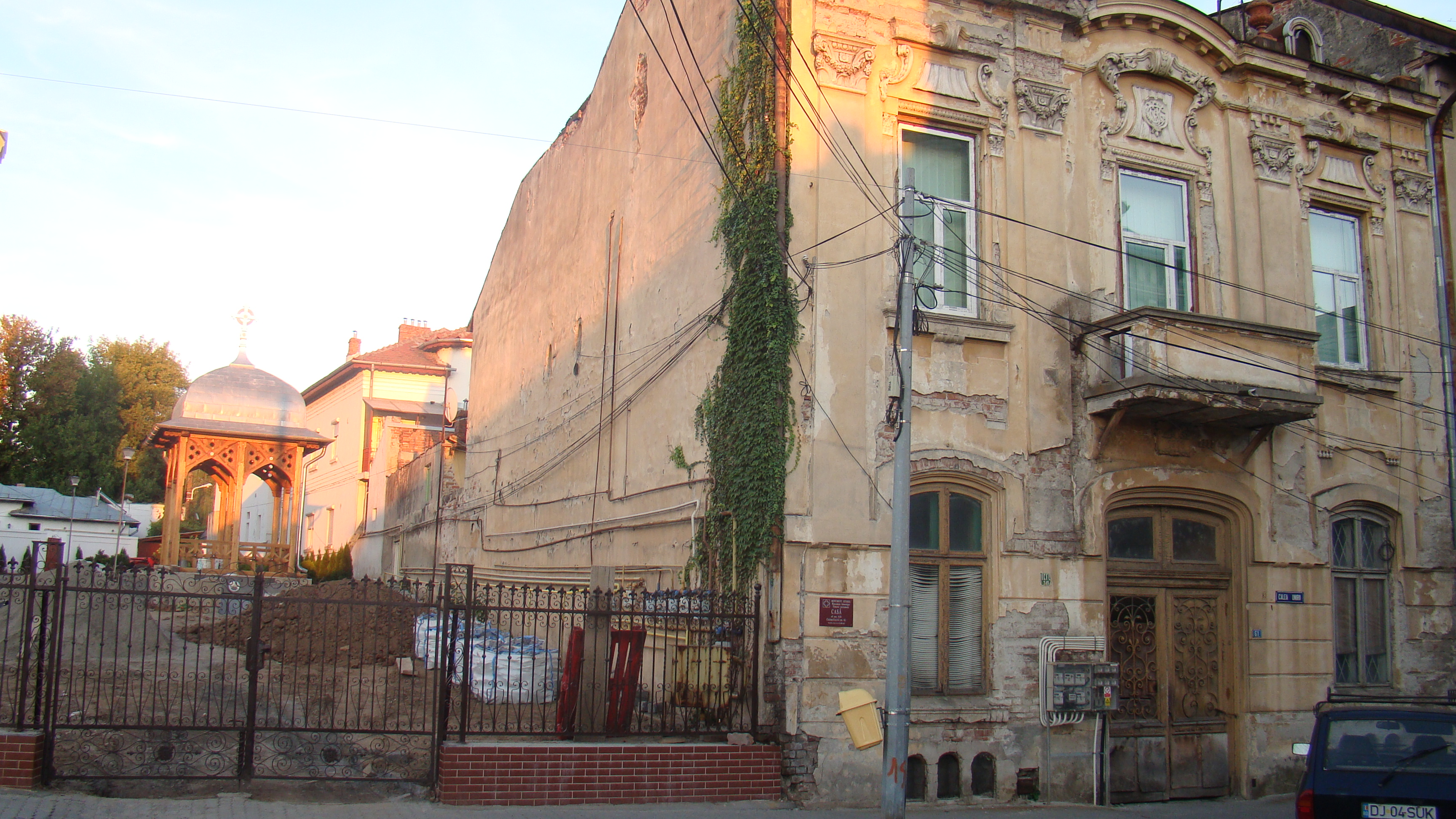 Casă Unirii 61